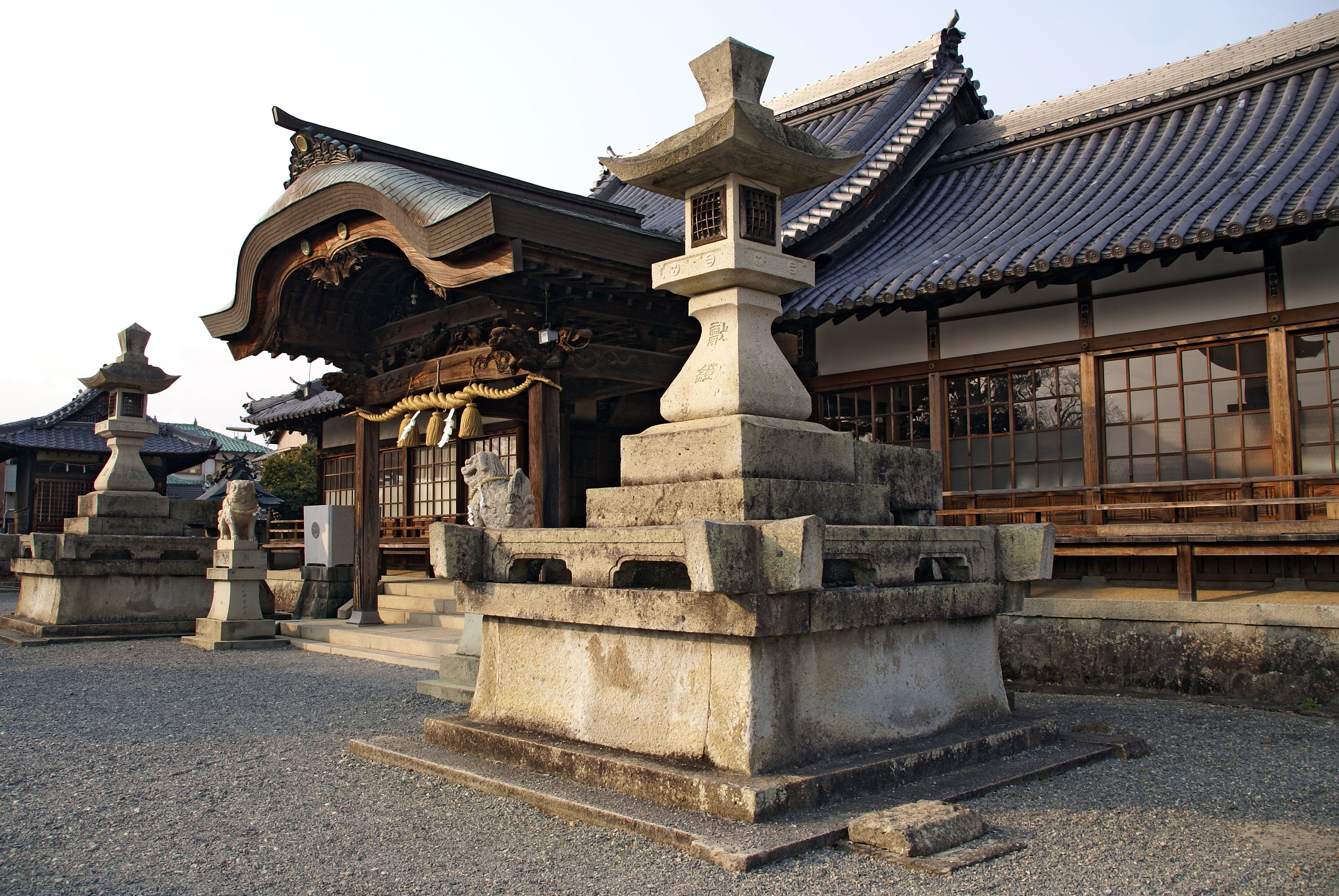 Sumiyoshi-jinja in Kasai, Hyogo, Japan